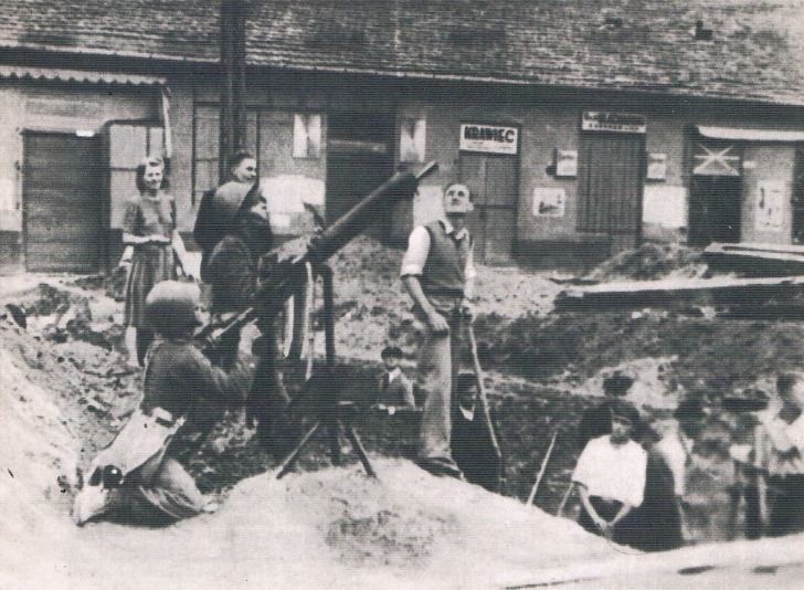 Obrona Warszawy 1939. Stanowisko obrony przeciwlotniczej - ckm wz. 30.